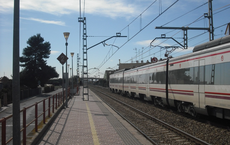 Estació de Roca-Cúiper (Meliana).